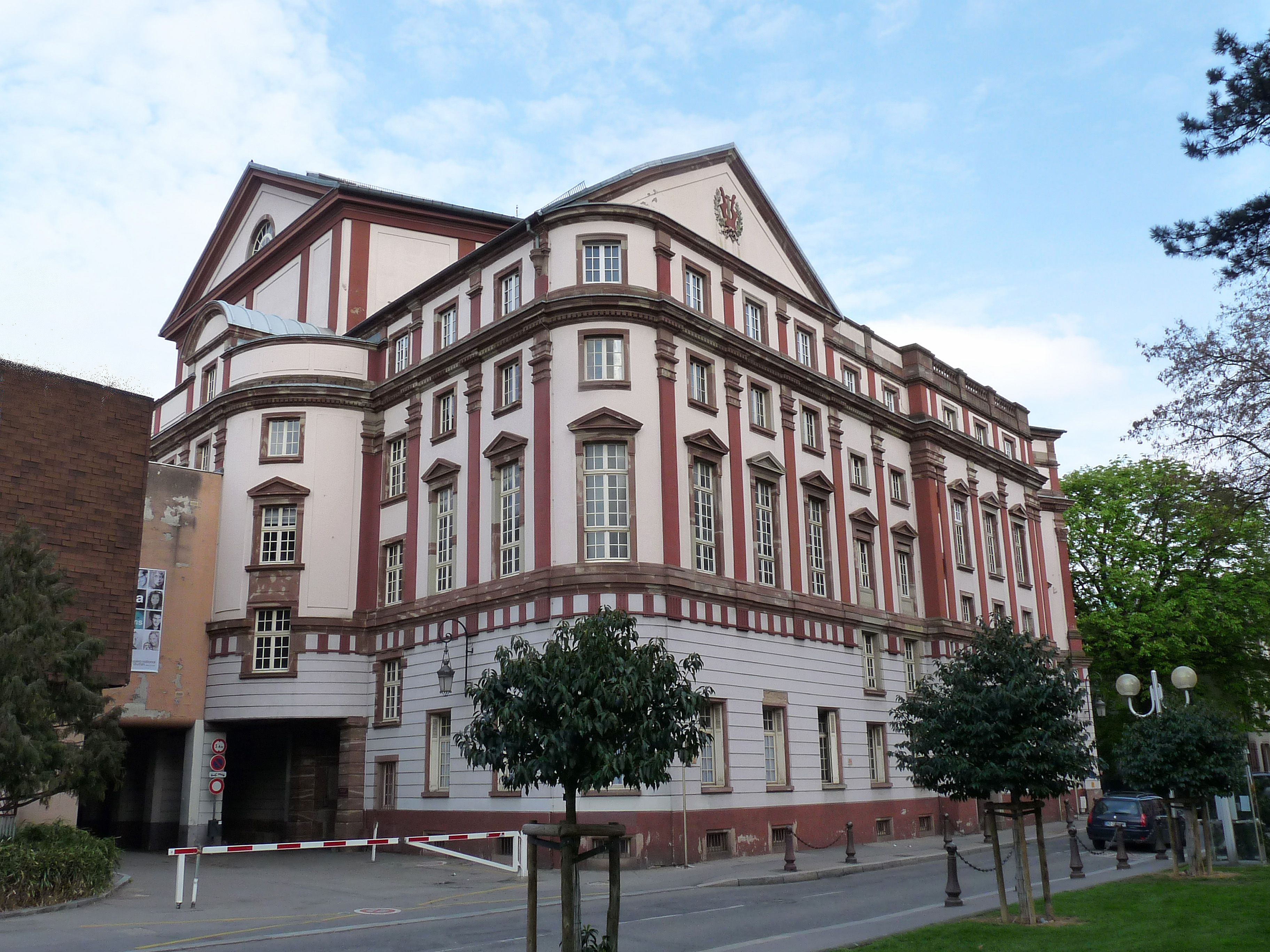 Mulhouse (Haut-Rhin) : Théâtre de la Sinne, côté parc